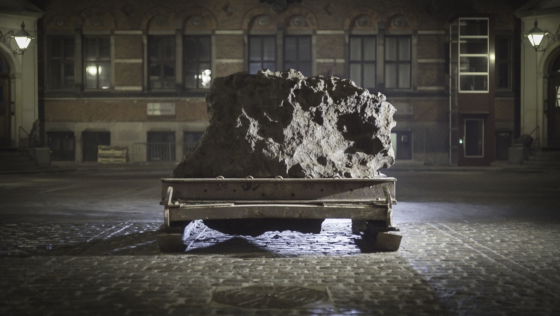 Meteoritten Agpalilik uden for Geologisk Museum i København.